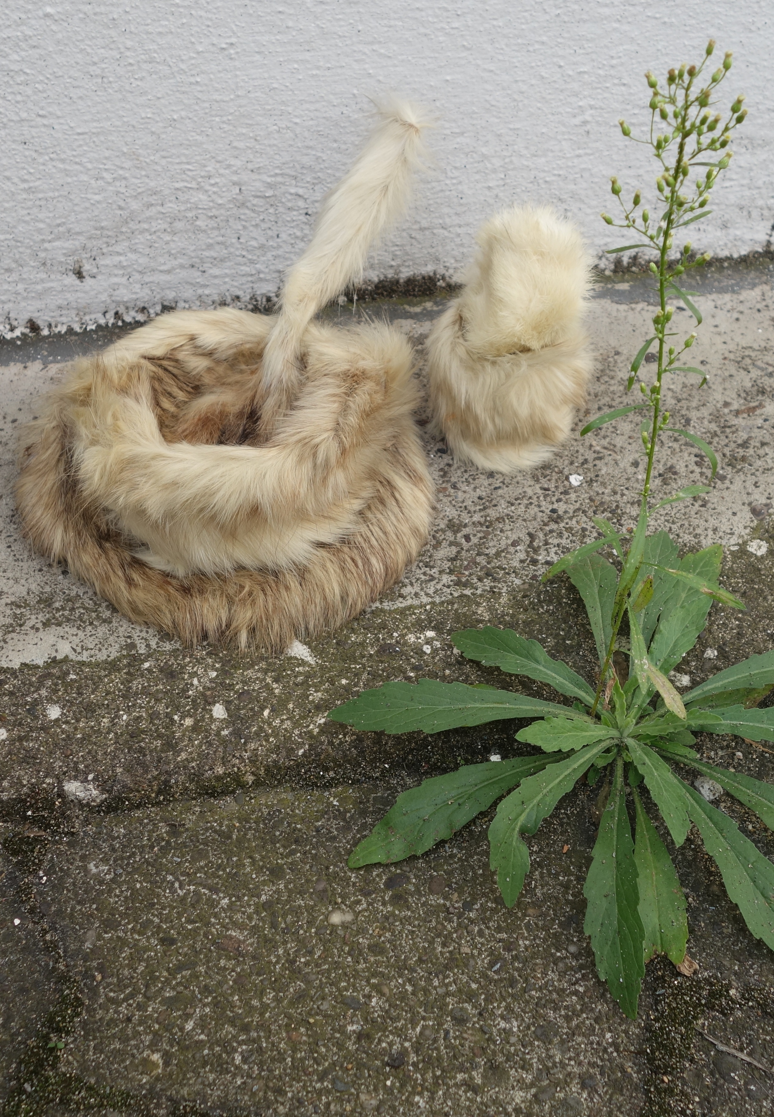 Viscacha-Tasse, -Untertasse, -Ei, -Eierbecher und -Kaffeelöffel. Material: Porzellan, Viscachafell, ausgeblasenes Hühnerei. Frei nach Meret Oppenheim Déjeuner en fourrure. Auftragsarbeit von Lutz Hans Dresen. Arbeit ausgeführt und erweitert um Ei und Eierbecher: Klaus-Peter Kuhn (ca. 1982). Der Porzellanteller und das Ei sind inzwischen zerbrochen (2017).